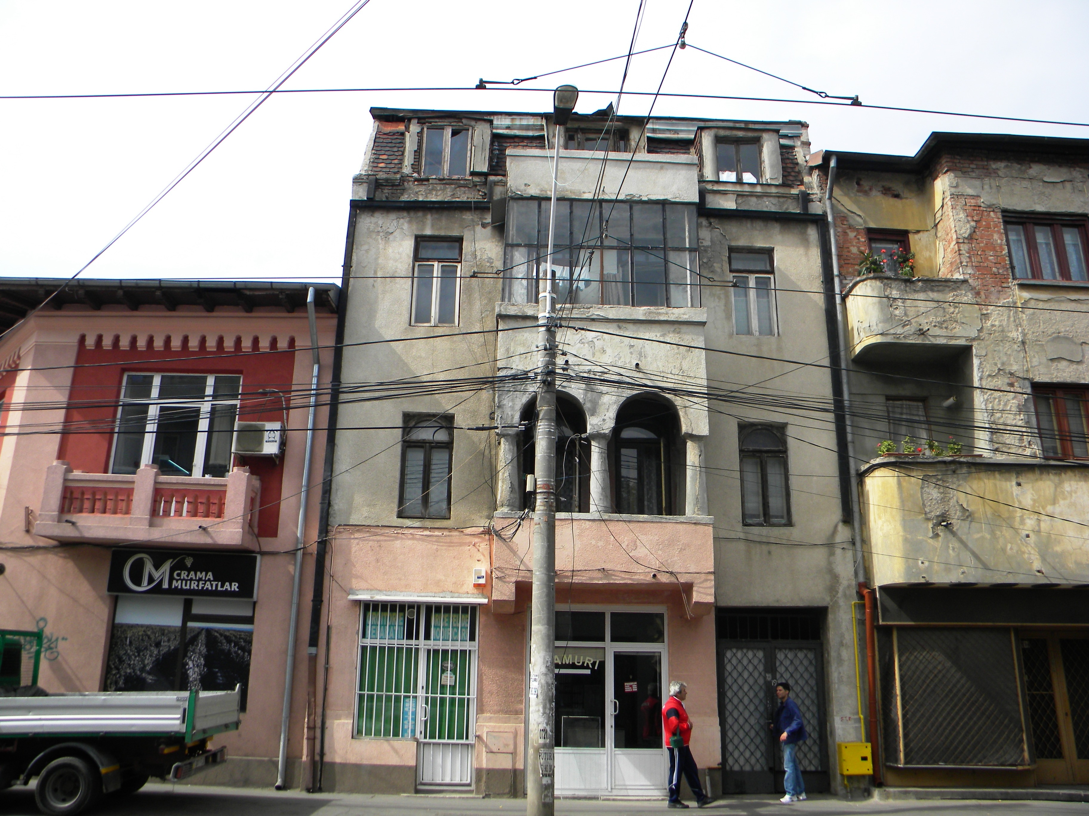 Bucuresti, Romania, Casa pe Str. Lizeanu nr. 19, sect. 2